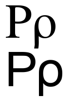 greek letter rho